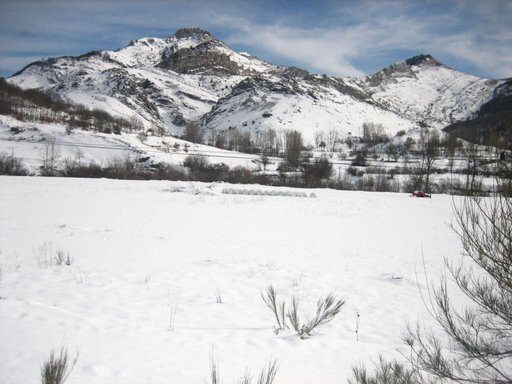 Crémenes en invierno